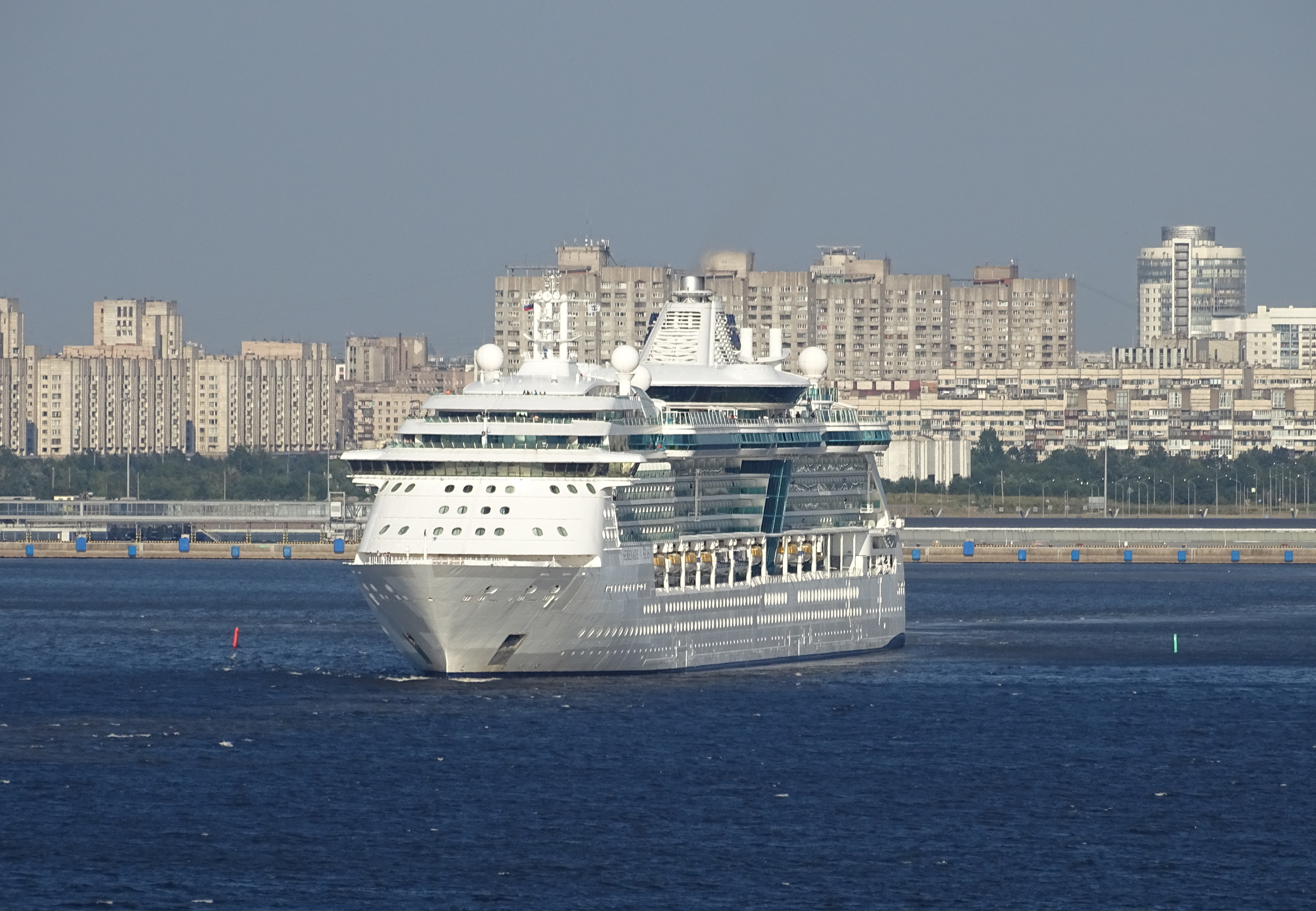 Het cruiseschep Serenade of the Seas in Saint Petersburg.